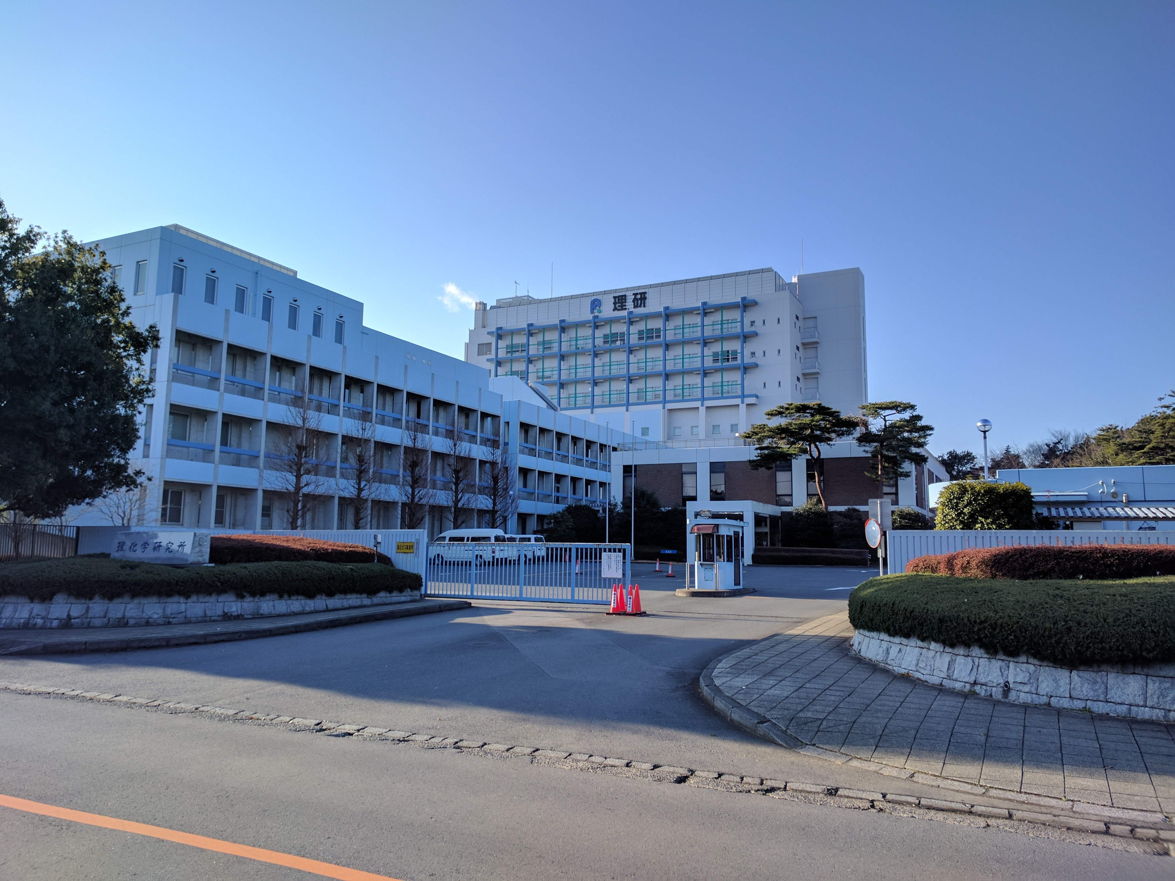 理化学研究所 バイオリソースセンター 筑波事業所